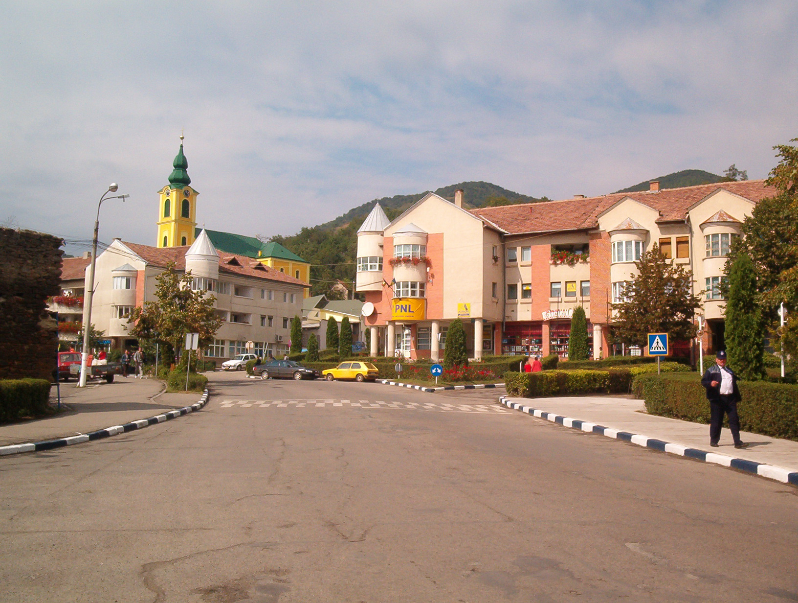 Szilágysomlyó város központja, Románia